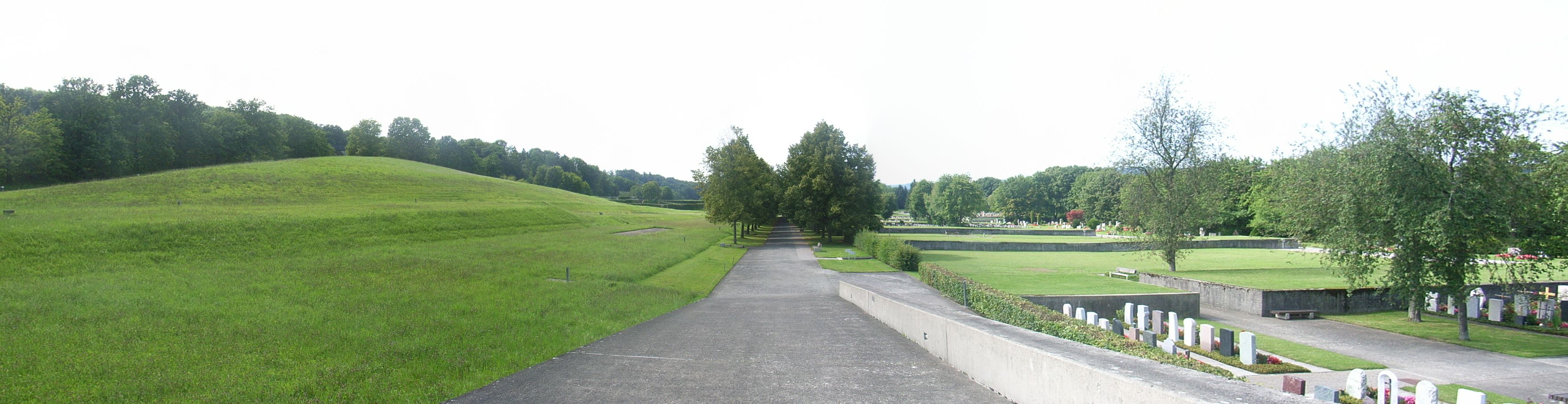 Bild des Friedhofs